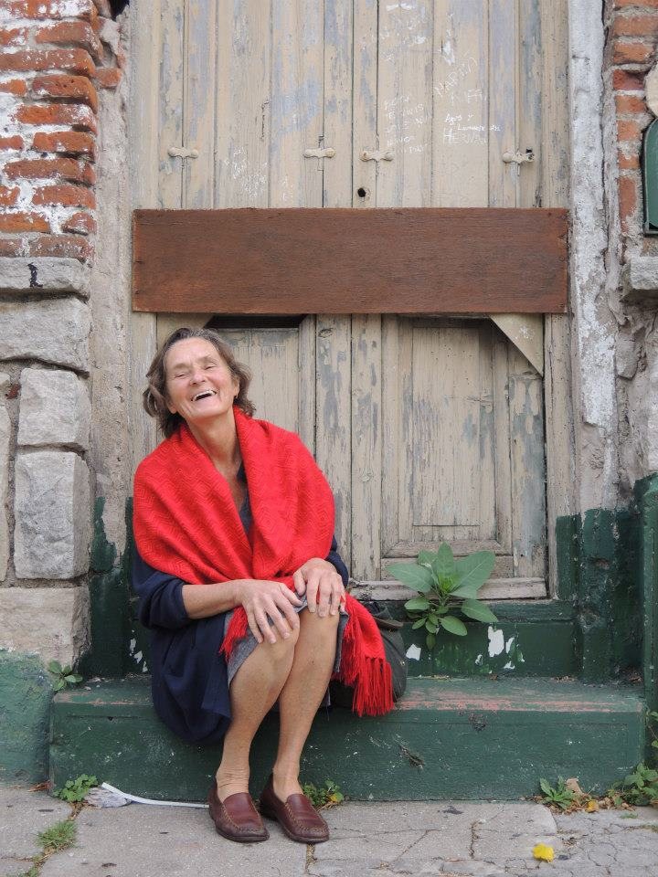 Magda en Mar del Plata - 18 de marzo de 2013